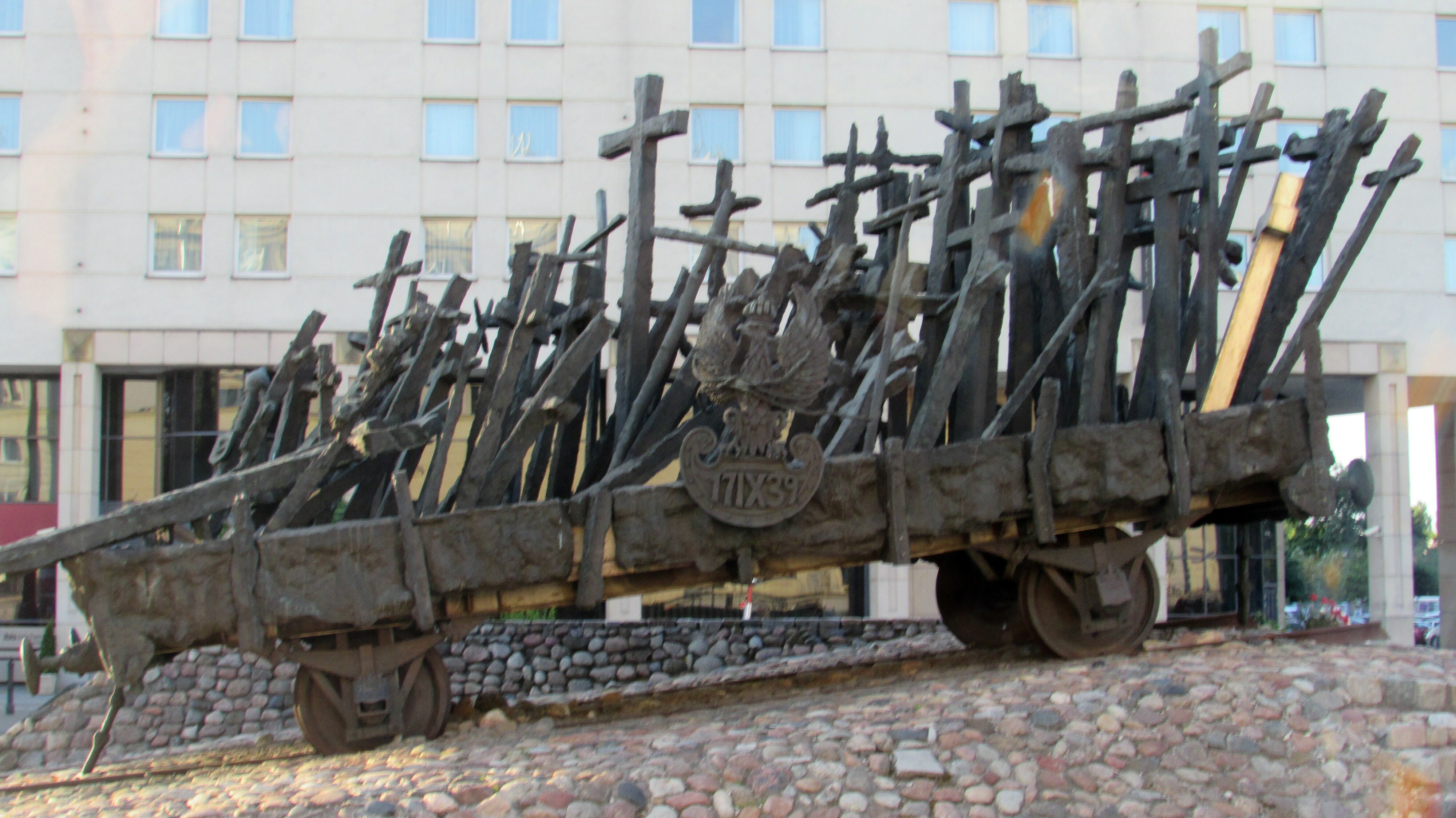 Warschau 17 September1939 Mahnmal